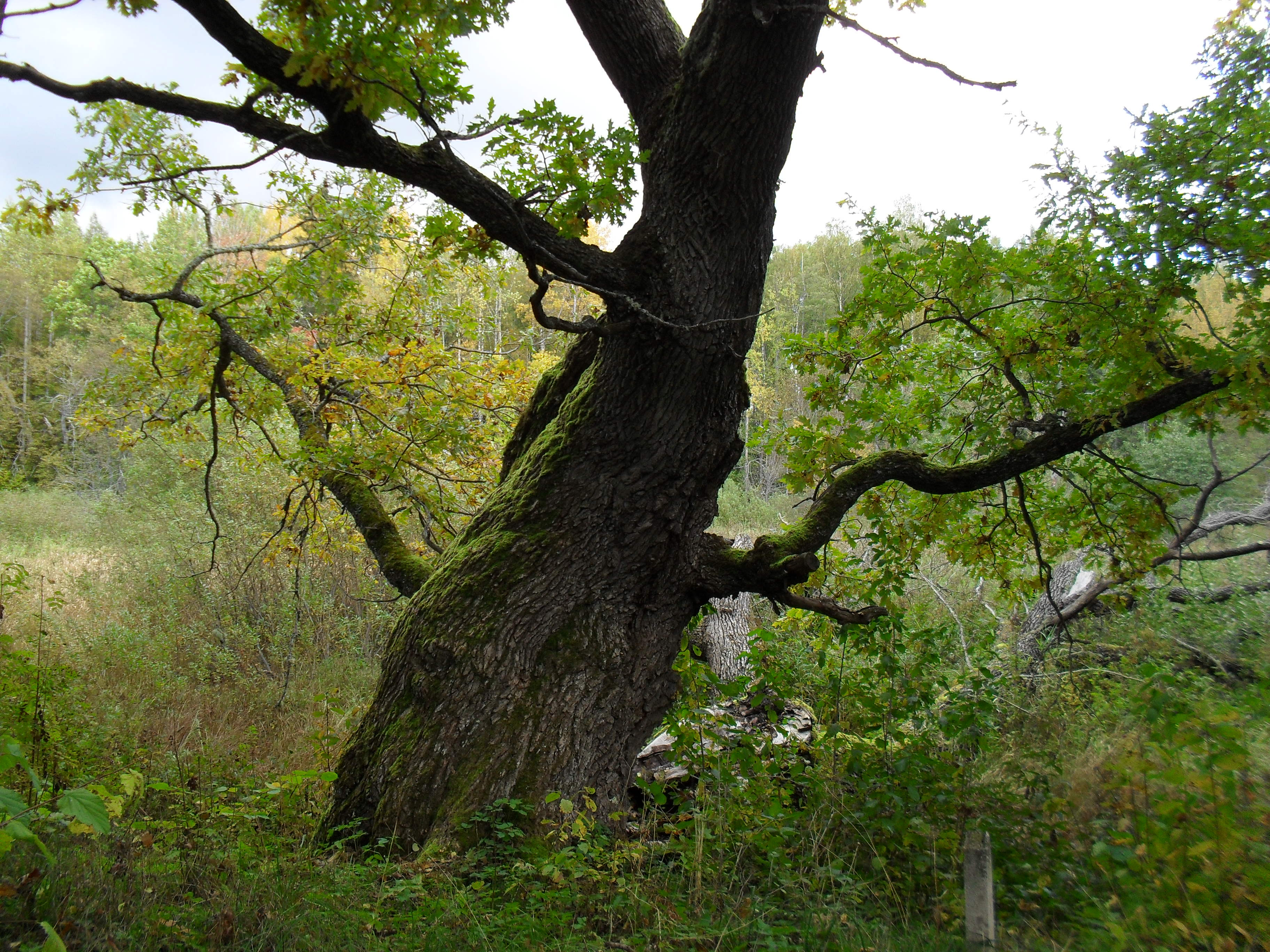 Taga-Roostoja tamm, kõige suurem Katmani tammedest. Ida-Virumaa, Iisaku vald, Lõpe küla.